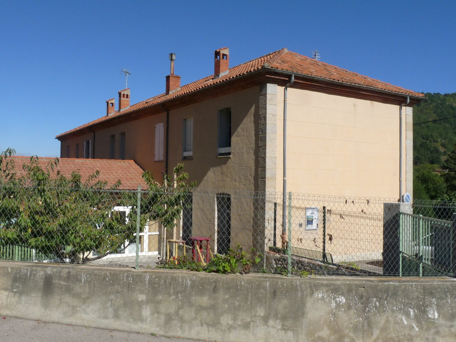 Ecole de Sahorre, Pyrénées-Orientales, France